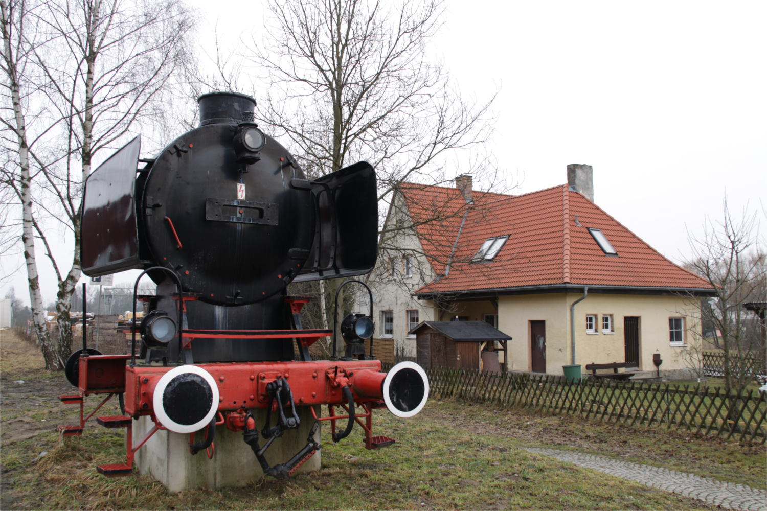 2011 03 19 Eslarn Bahnhof und Denkmal